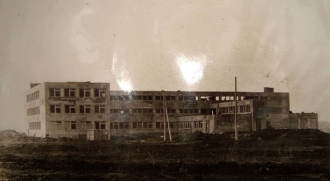 Новооржицька школа у 1978